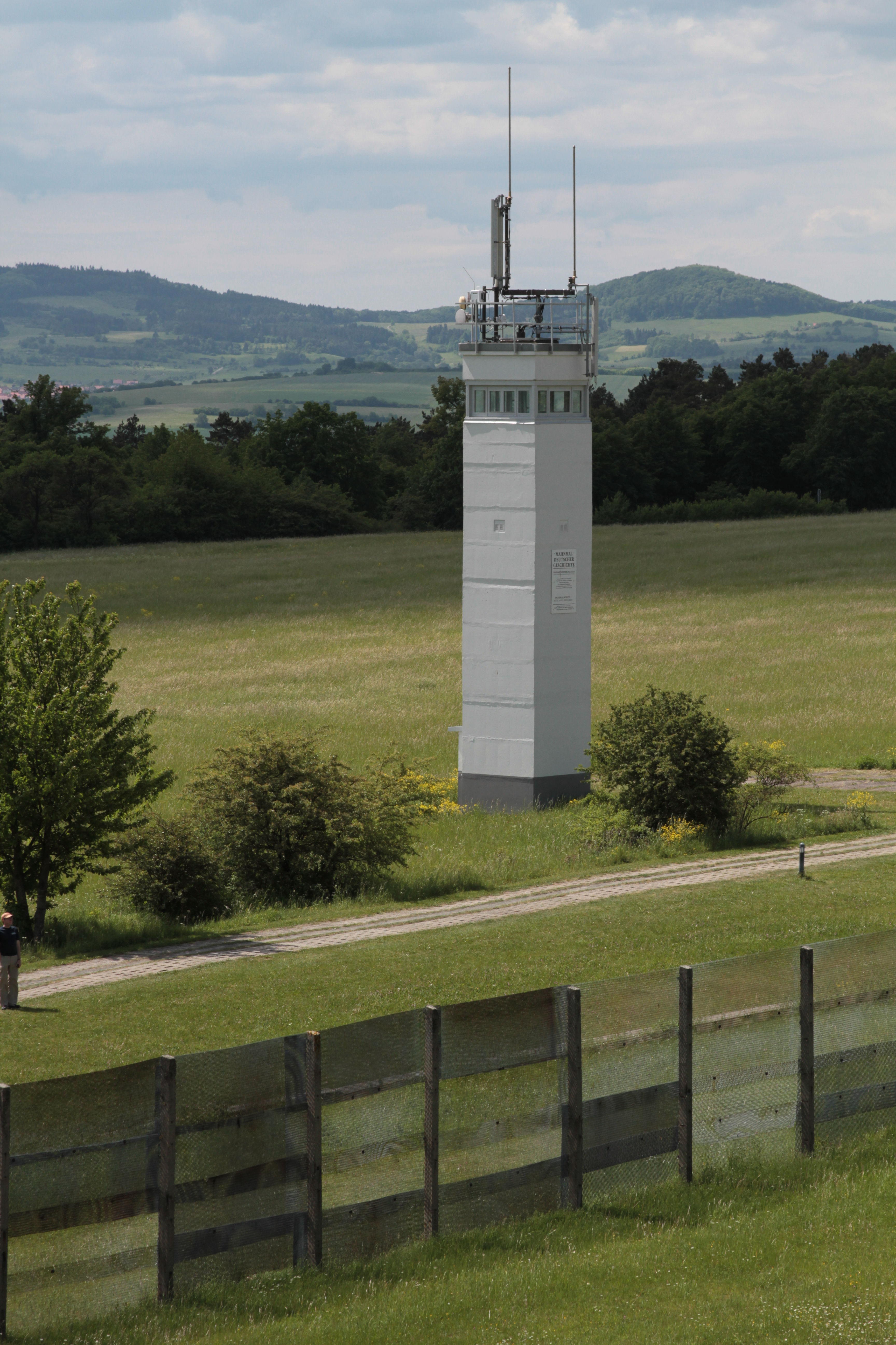 ehem. Wachturm der DDR-Grenztruppen, 36169 Rasdorf, Germany